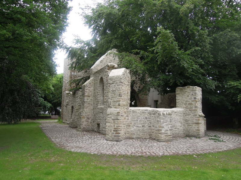 Restaurierte Ruine der Sylvesterkapelle im Schloßpark Haus Weitmar